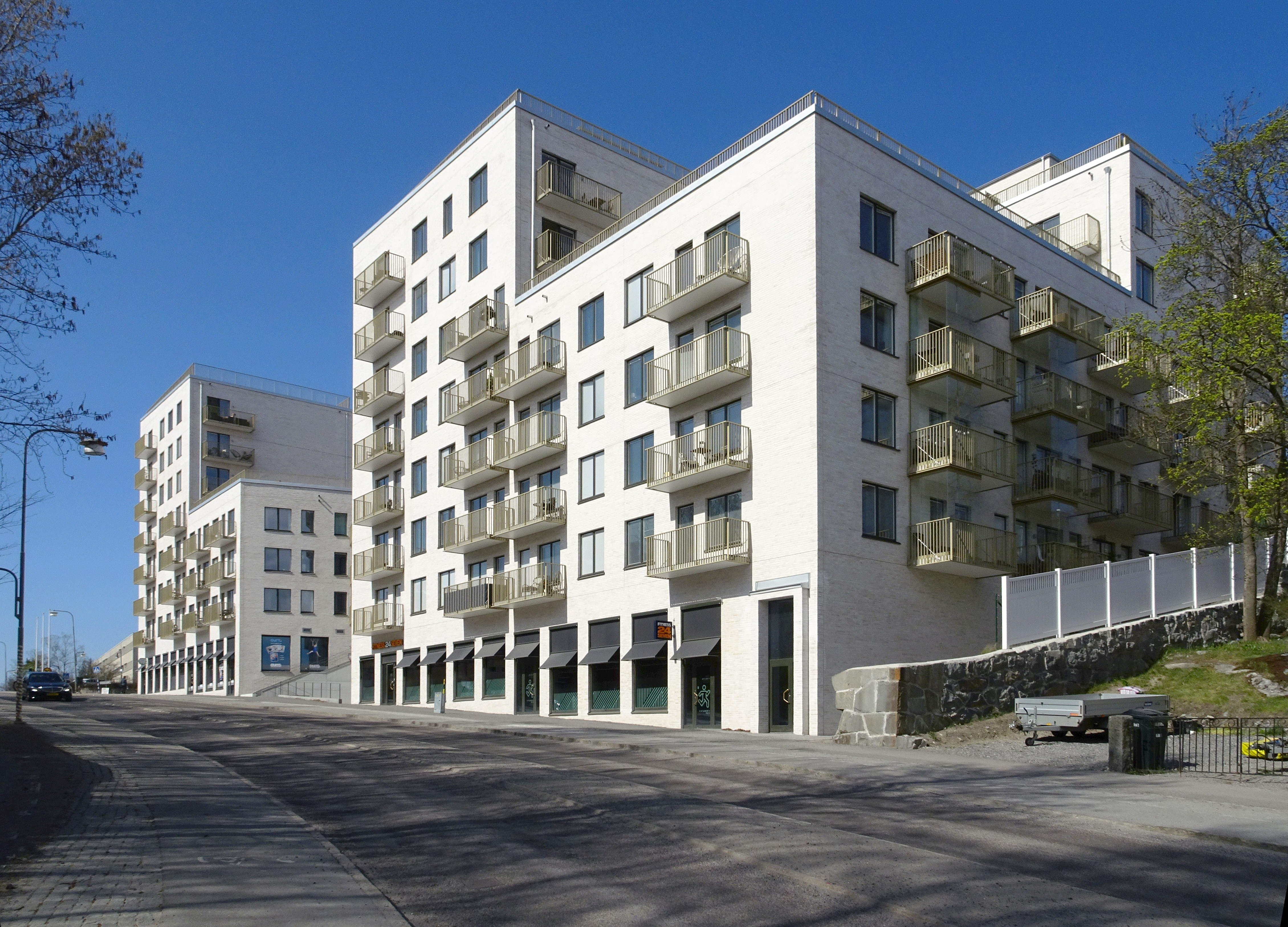 Projekt: Alprosen Typ av projekt: Flerbostadshus Fastighet: Alphyddan 11 Adress: Bällstavägen 28 Stadsdel: Bromma Byggherre: Storstaden Stockholm Bostad AB Arkitekt: VERA Arkitekter